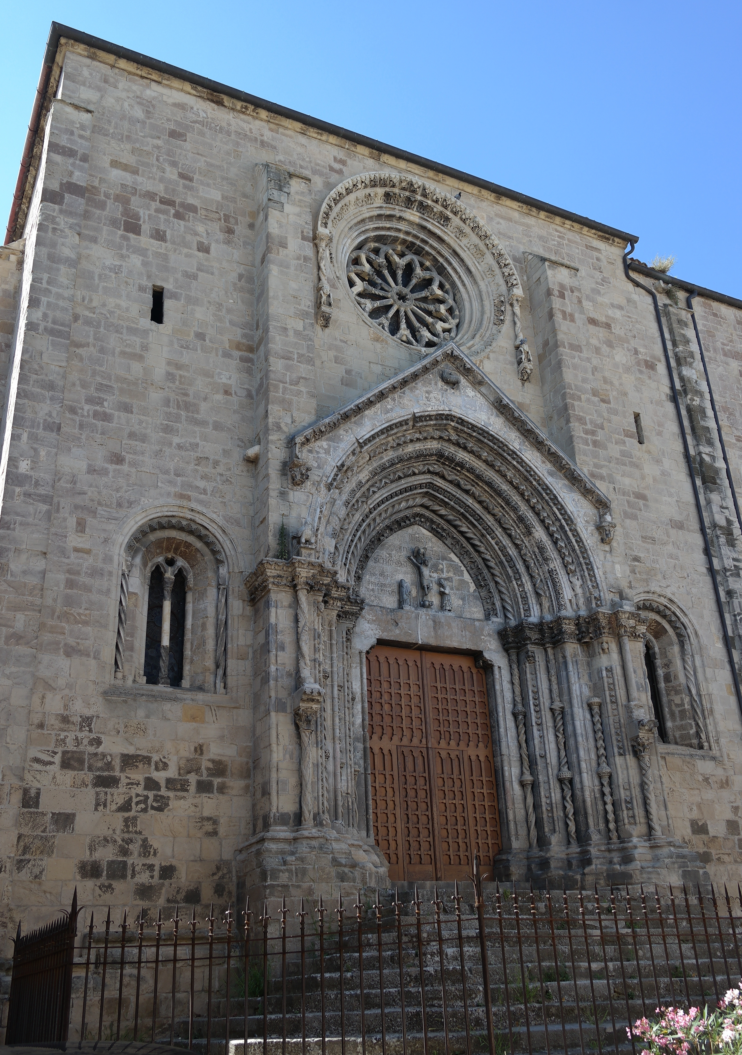 Chiesa di Santa Maria Maggiore a Lanciano